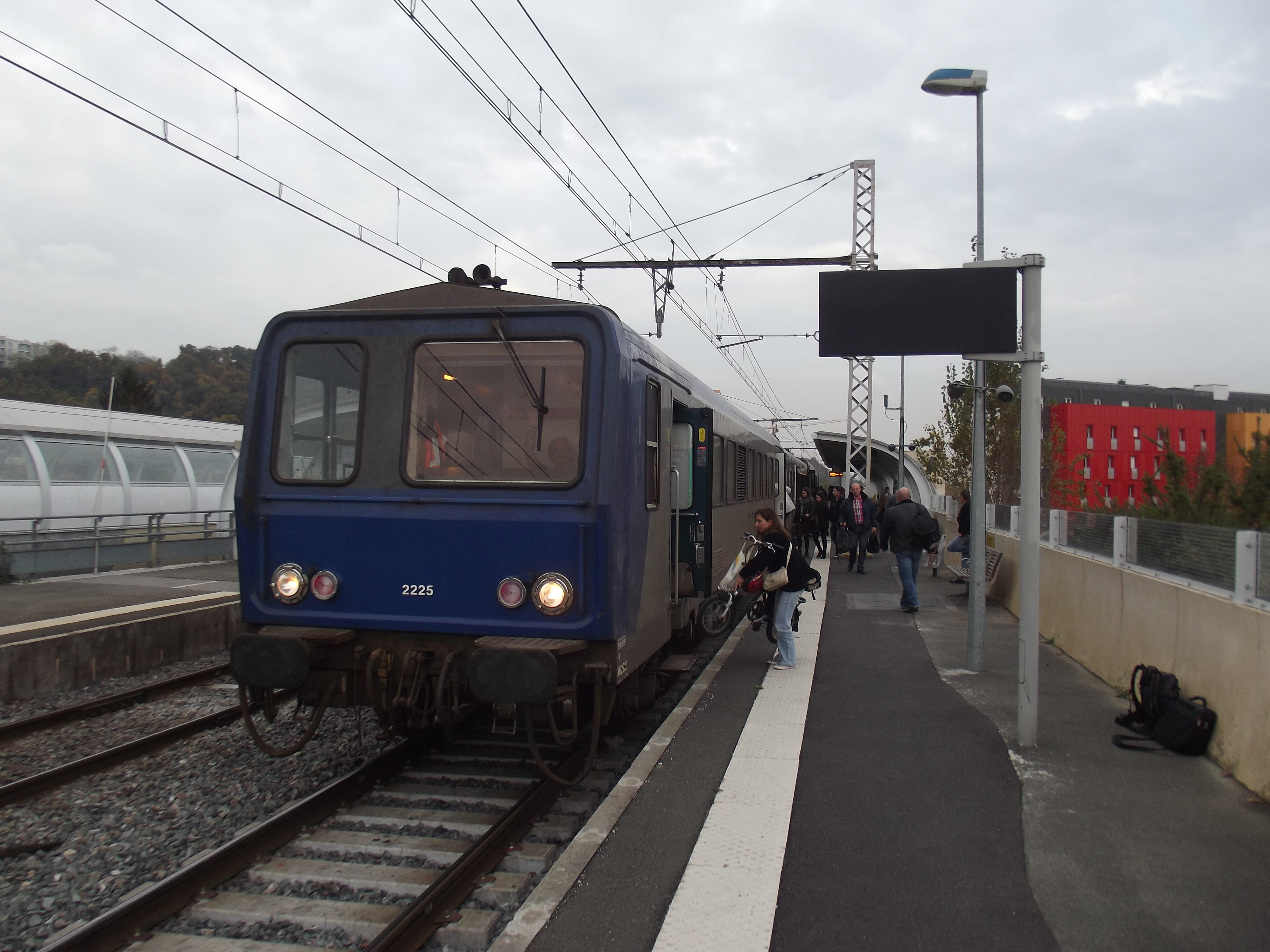 Voorstadstation Cenon bediend door een TER trein